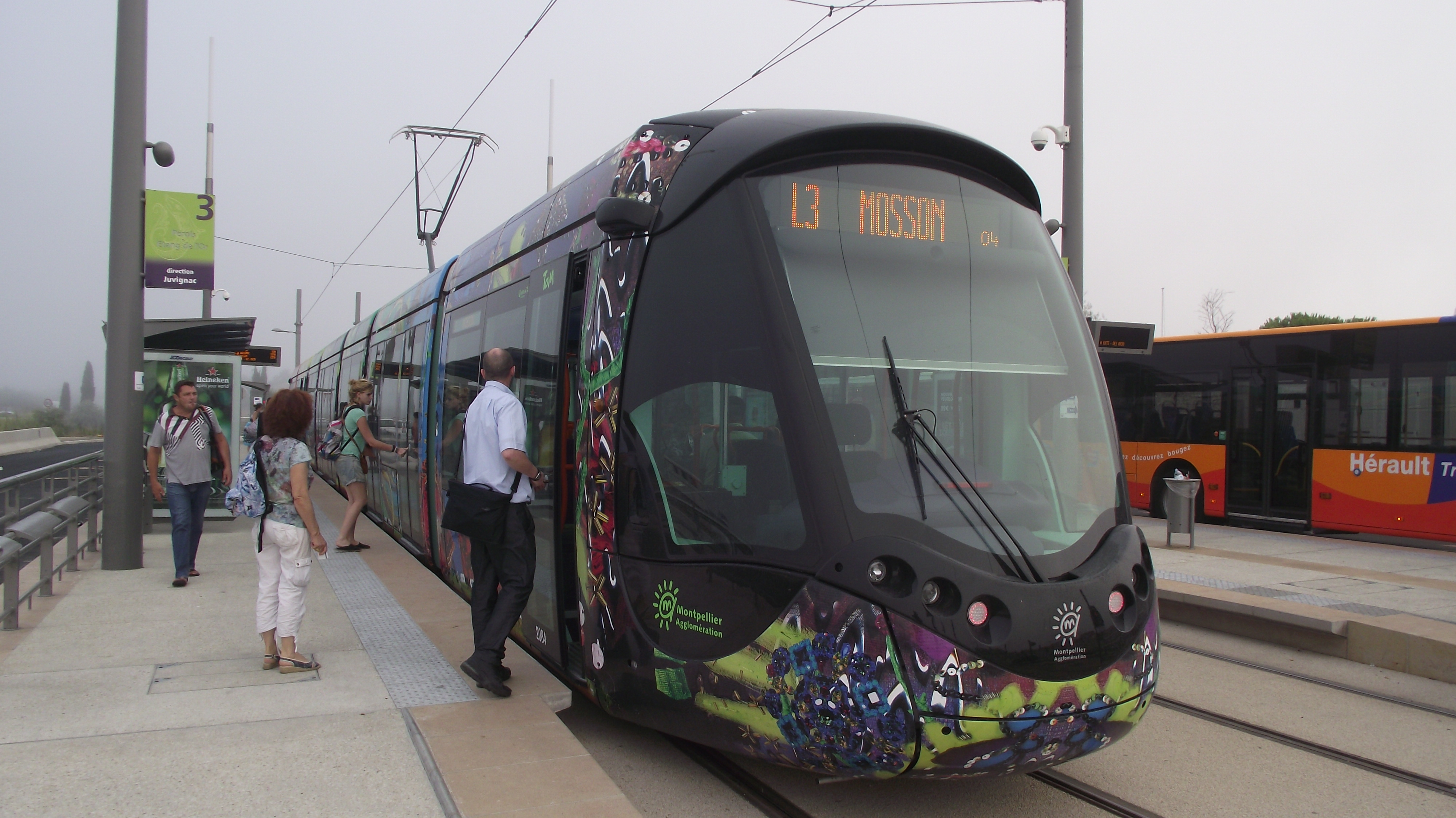 Tramlijn 3 bij het eindpunt Pérols Étang de l'Or